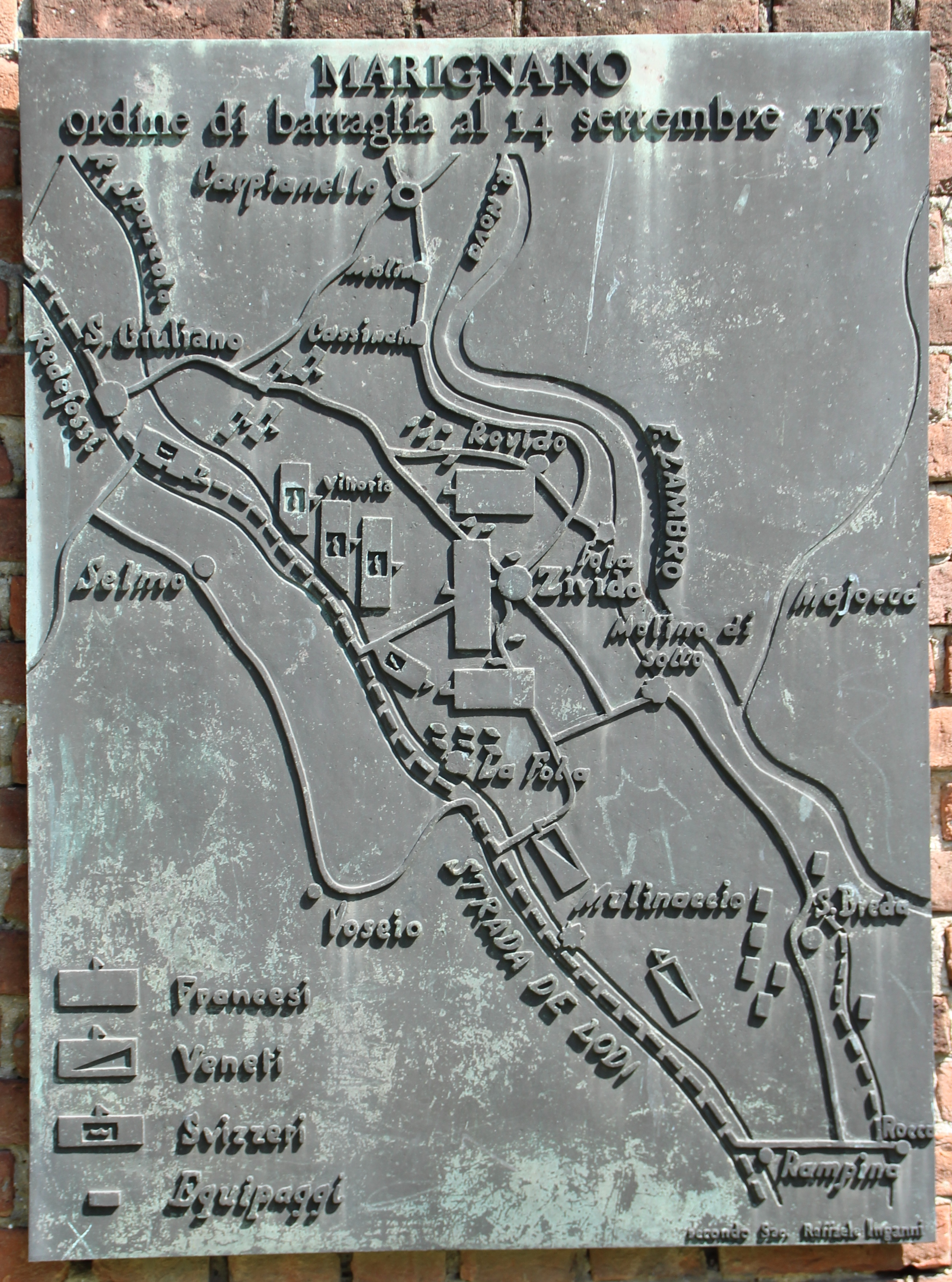 Tafel der Schlachtordnung der Schlacht von Marignano 1515 in Zivido bei San Giuliano Milanese